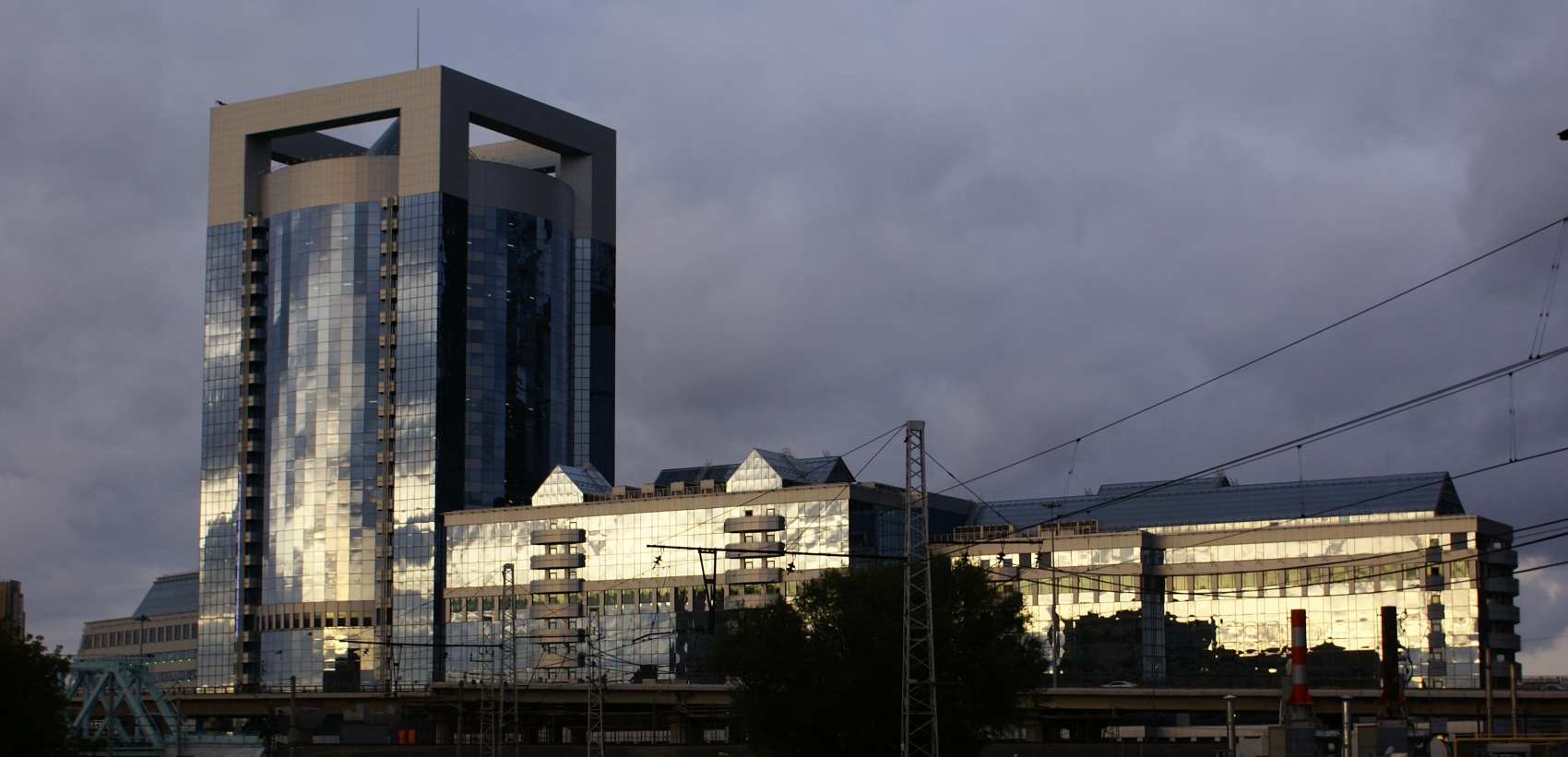 Северная башня/Nothern Tower